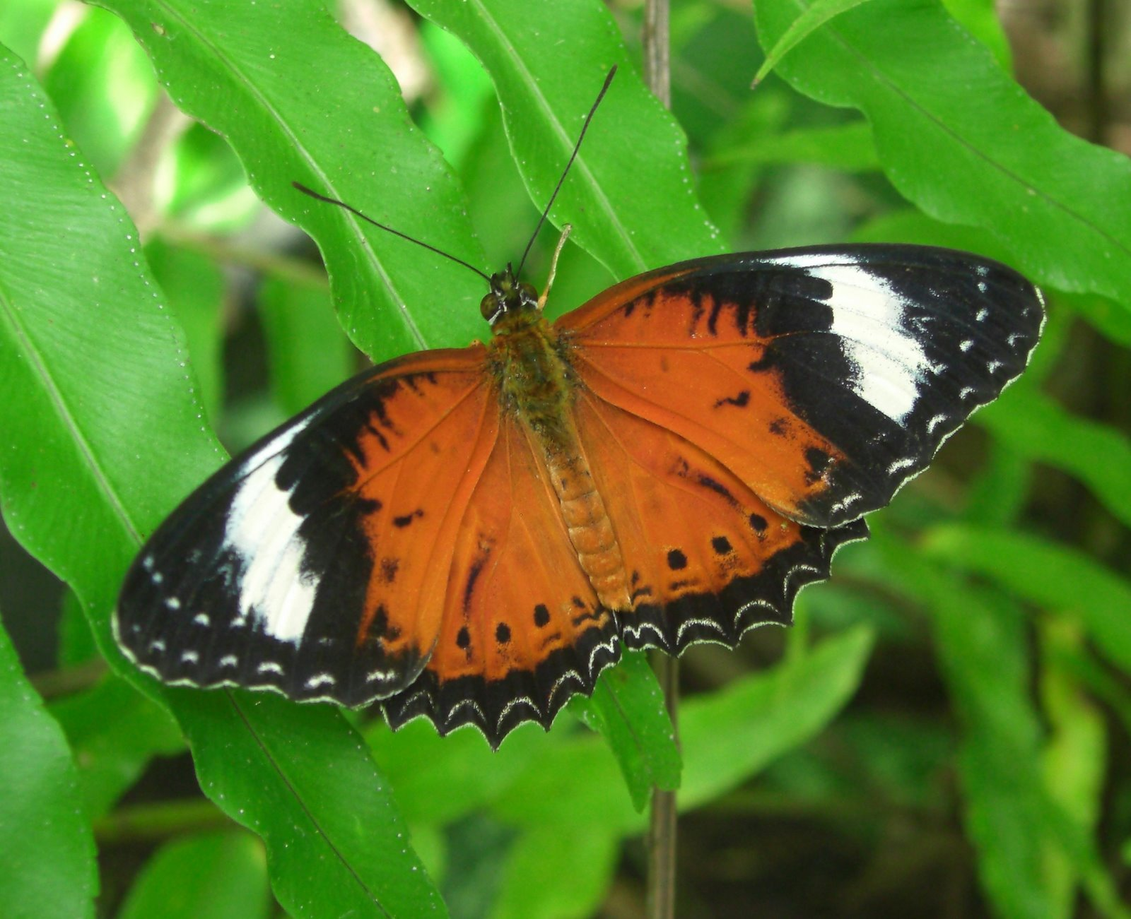 Australian Butterfly Sanctuary - Kuranda near Cairns, Queensland